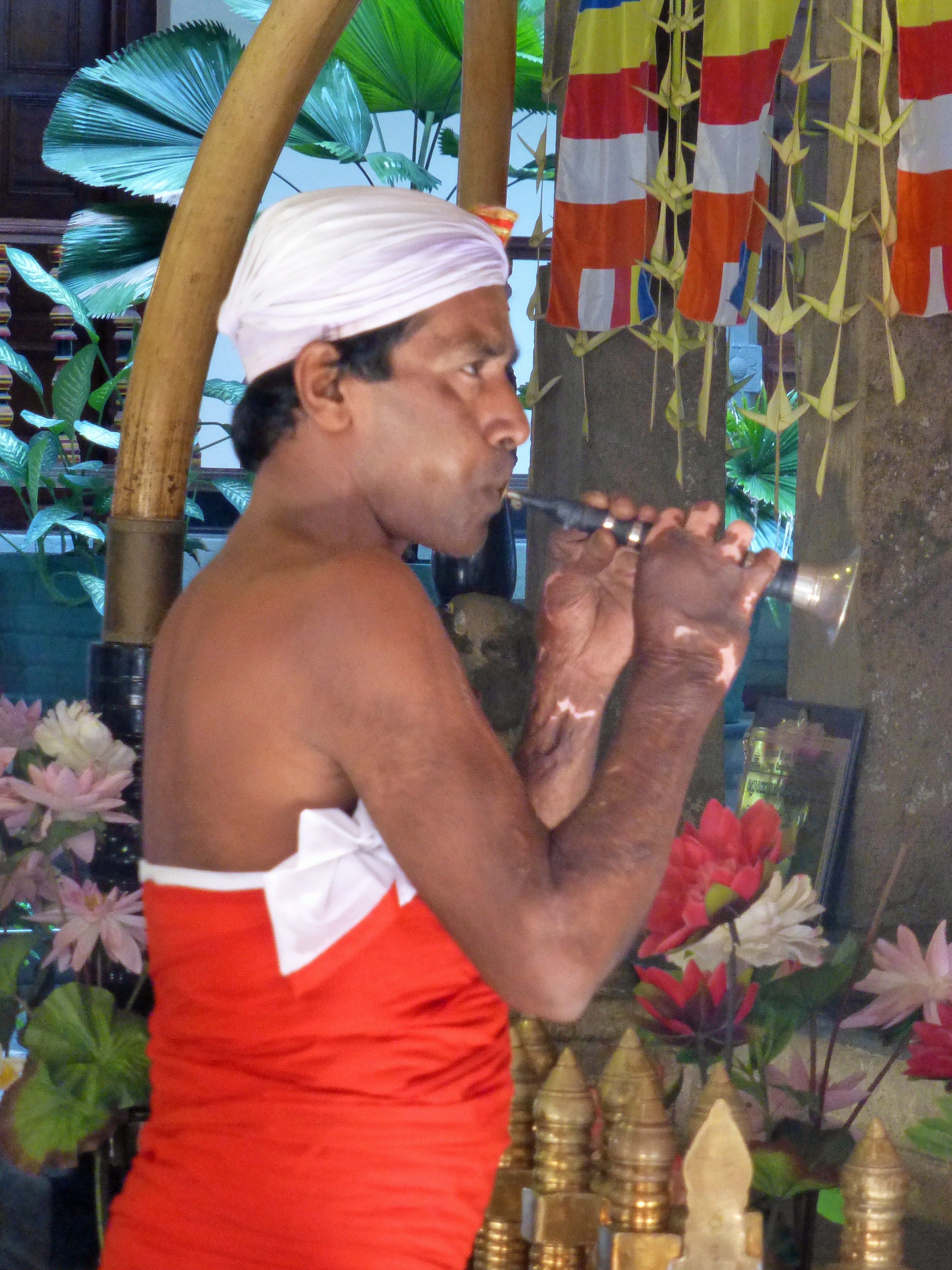 Musiciens au Temple de la Dent de Bouddha à Kandy (Sri Lanka)